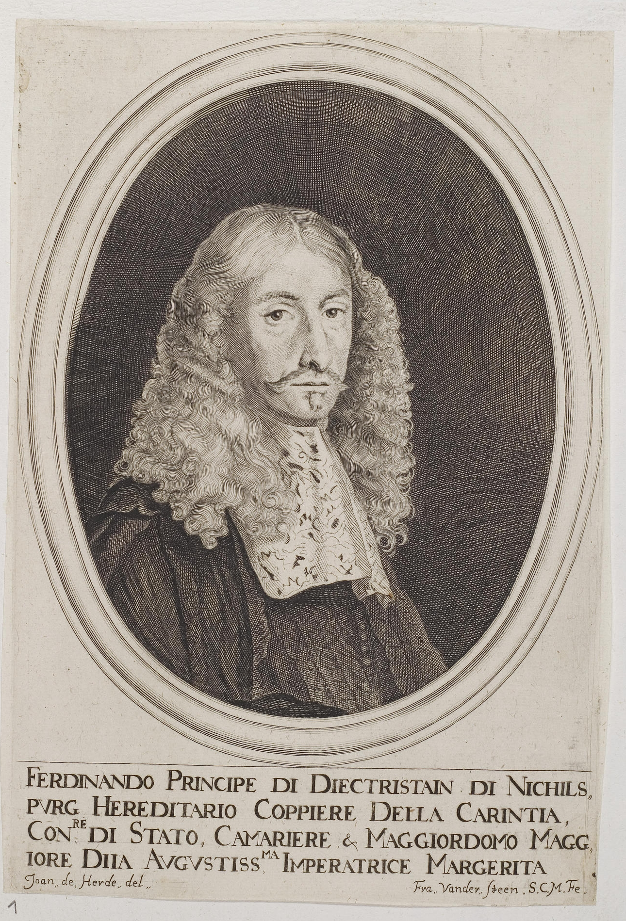 Grafik aus dem Klebeband Nr. 2 der Fürstlich Waldeckschen Hofbibliothek Arolsen Motiv: Ferdinand Joseph von Dietrichstein, Obersthofmeister, Konferenzminister und Geheimer Rat des Kaisers Leopold I. sowie Ritter des Ordens vom Goldenen Vlies